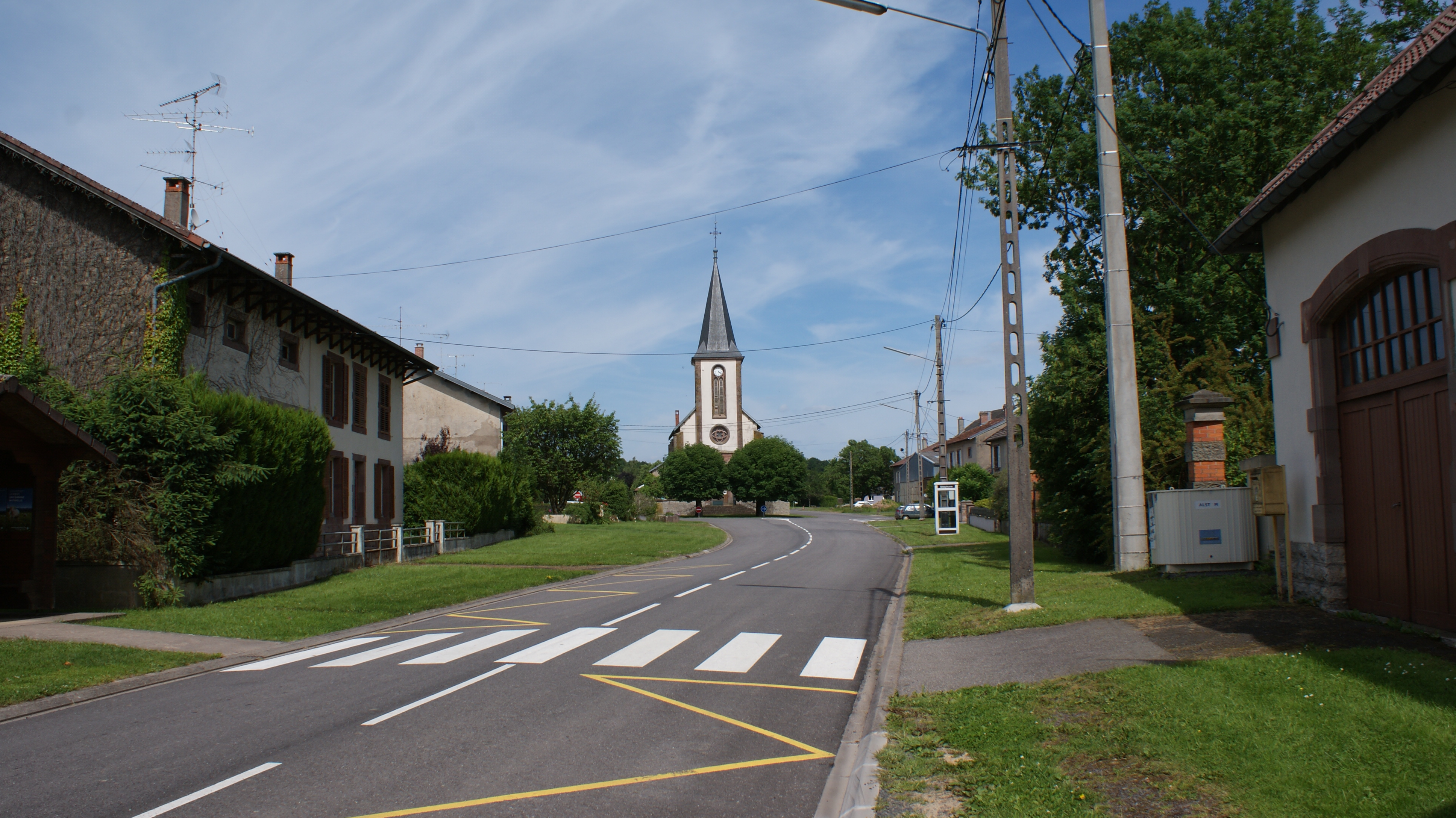 centre du village, église et fontaine.